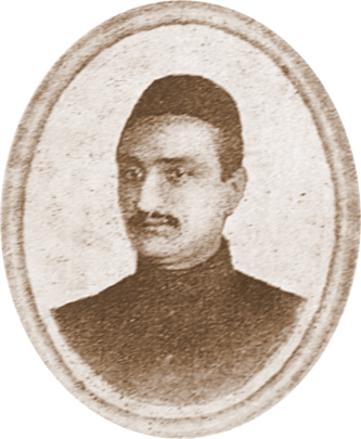 Nigoğos Balyan'ın portresi